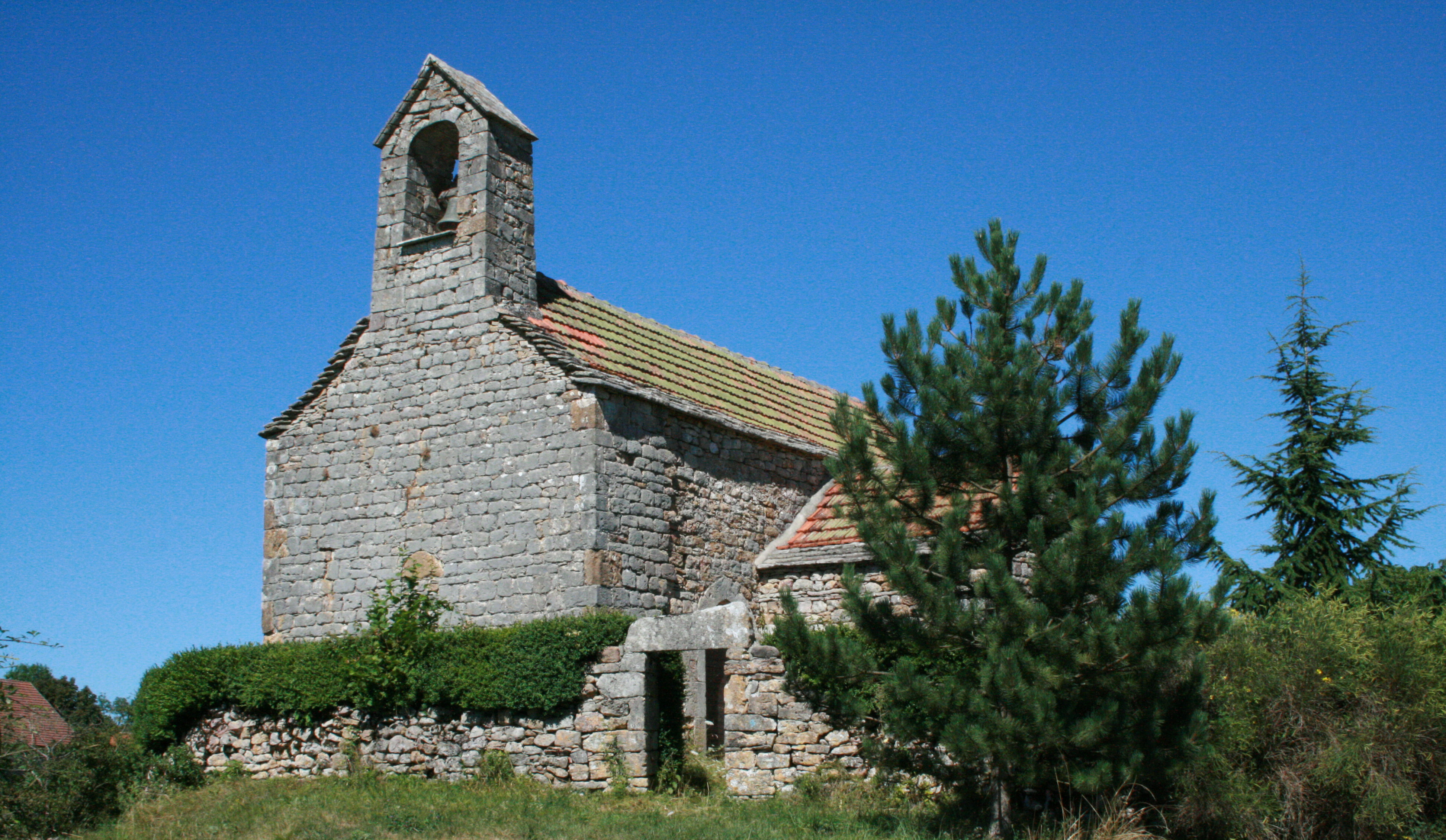 Église de Rinhodes, sur la commune d'Ols-et-Rinhodes (Aveyron)